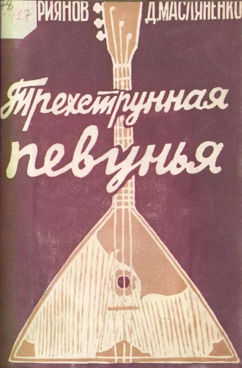 Обложка книги "Трёхструнная певунья. Балалайка" Д.А.Масляненко и В. П. Киприянова